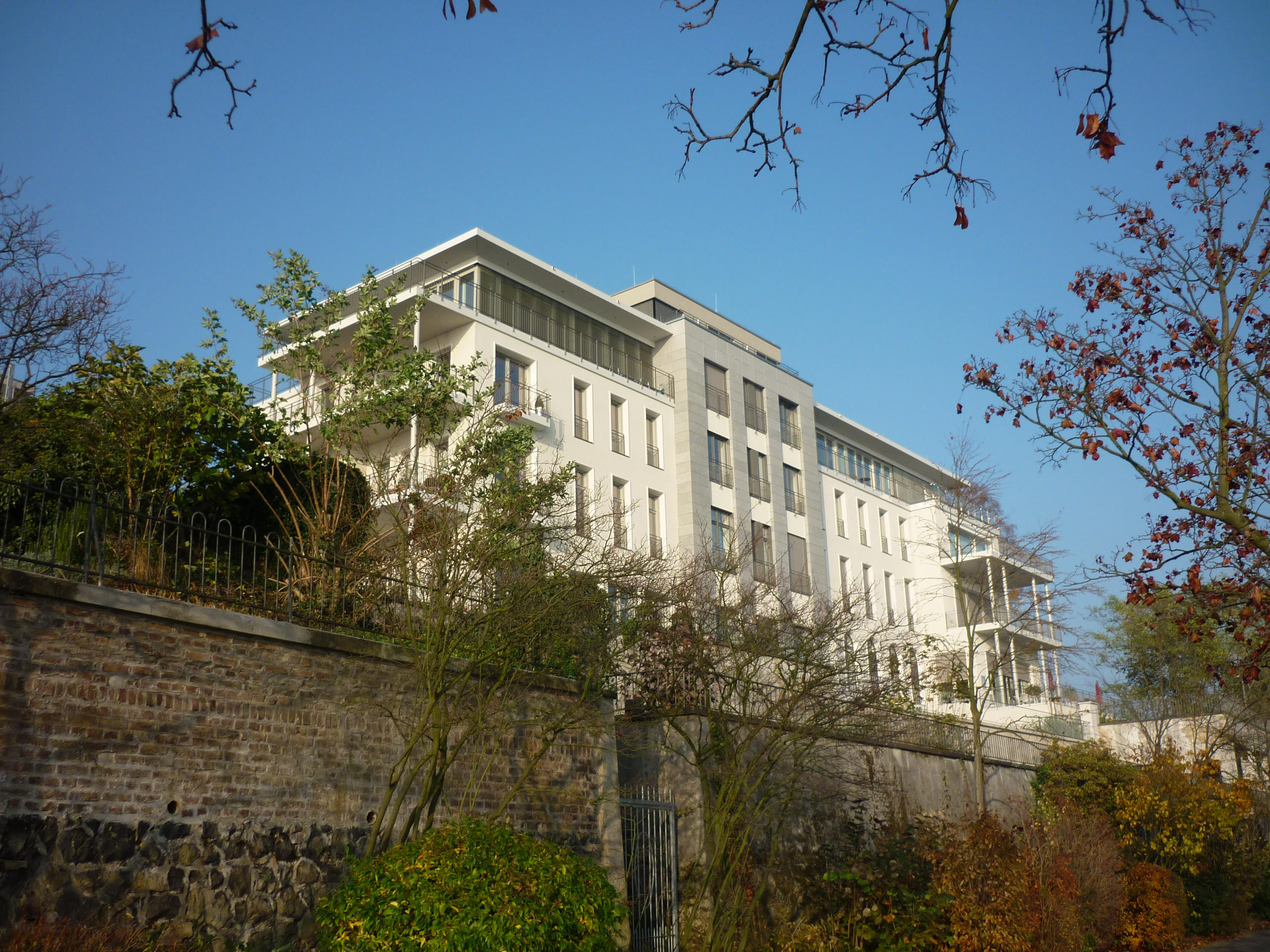 Godesberger Hof, Rüngsdorf: Ansicht vom Von-Sandt-Ufer